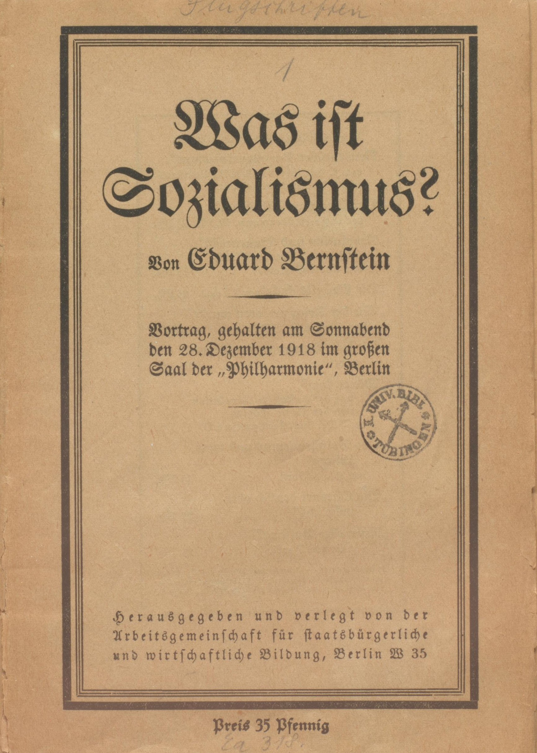 Eduard Bernstein Was ist Sozialismus? Vortrag 28. Dezember 1918